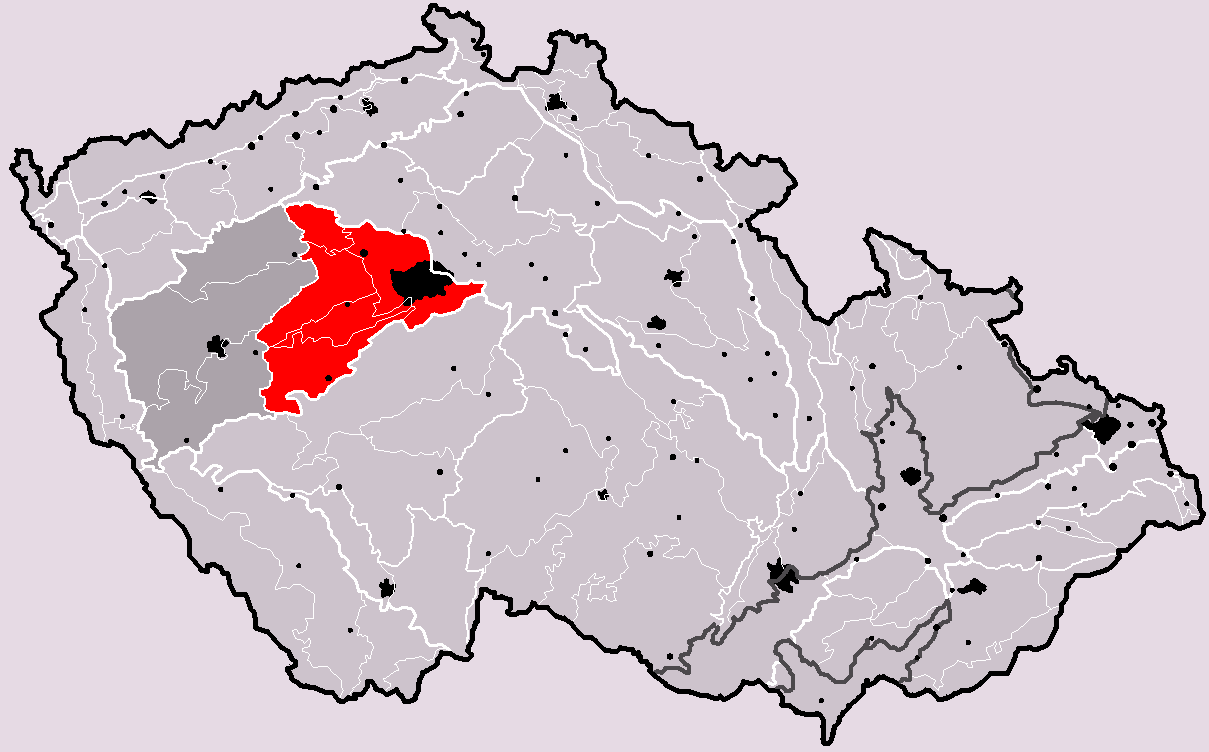 Poloha geomorfologické oblasti (podsoustavy) Brdská oblast v rámci České republiky. Hercynský systém Hercynská pohoří I Česká vysočina I5 (V) Poberounská subprovincie I5A (VA) Brdská oblast